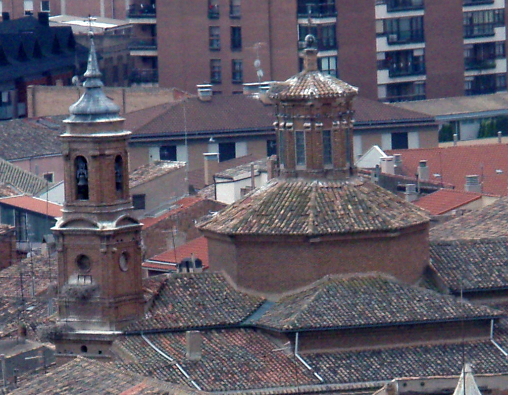 Torres de la Iglesia de San Jorge el Real (Tudela), en 2010 (desde Corazón de Jesús)